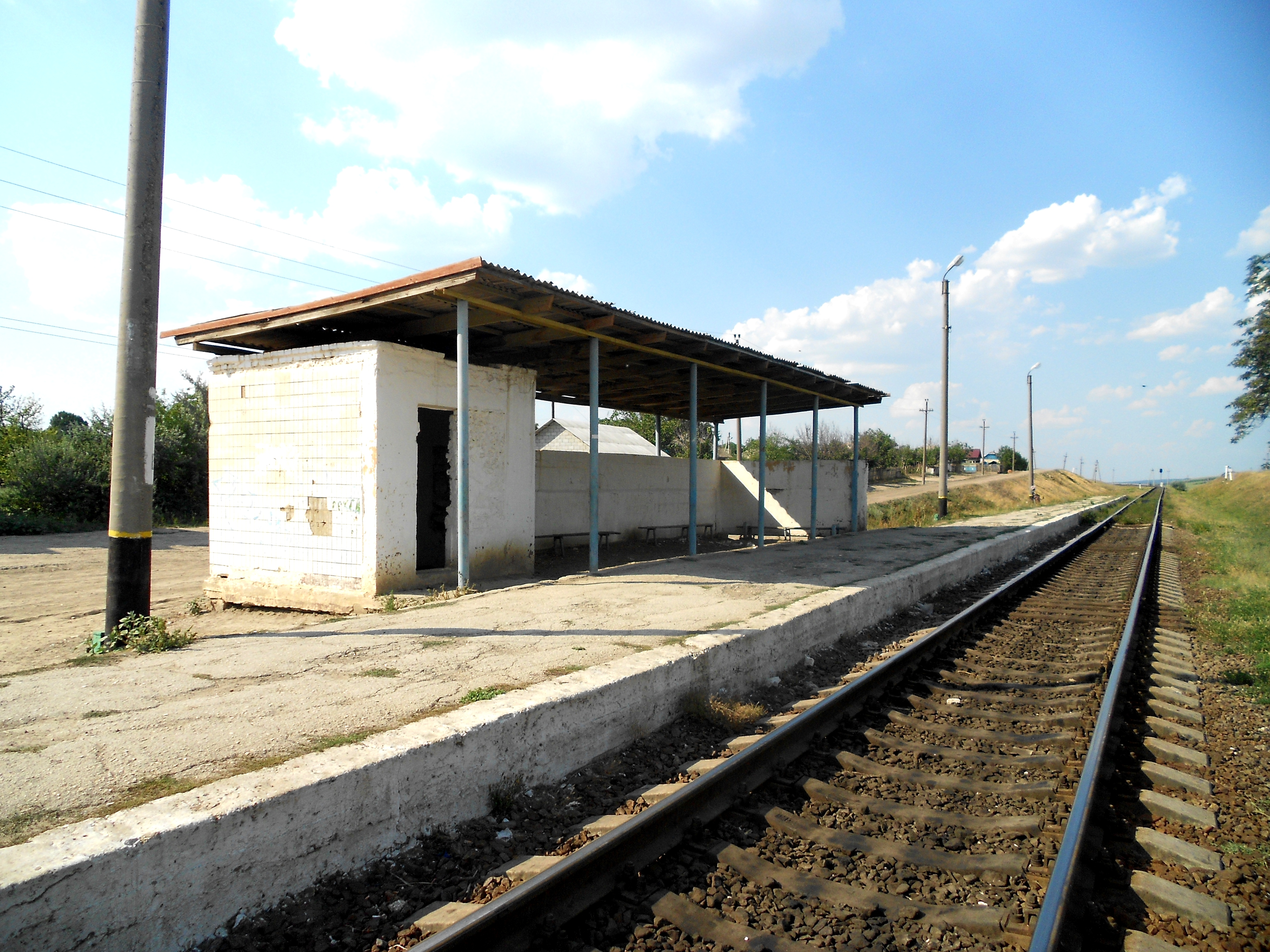 Stația feroviară din s. Scumpia, r. Fălești